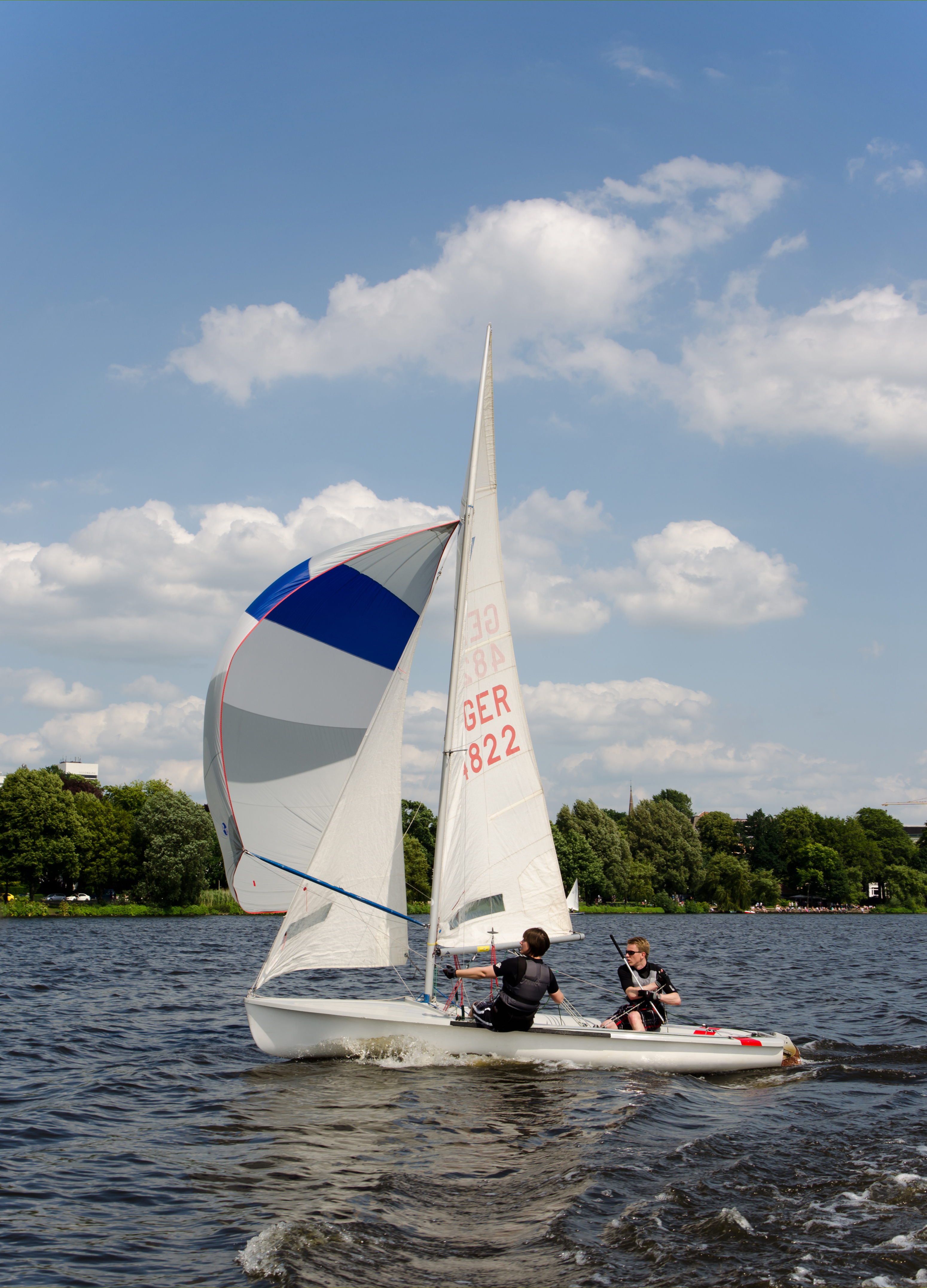 Segelboot der 470er Klasse auf der Außenalster